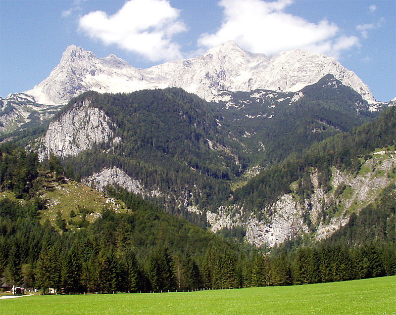 Großer Priel, mountain in Totes Gebirge in Austria